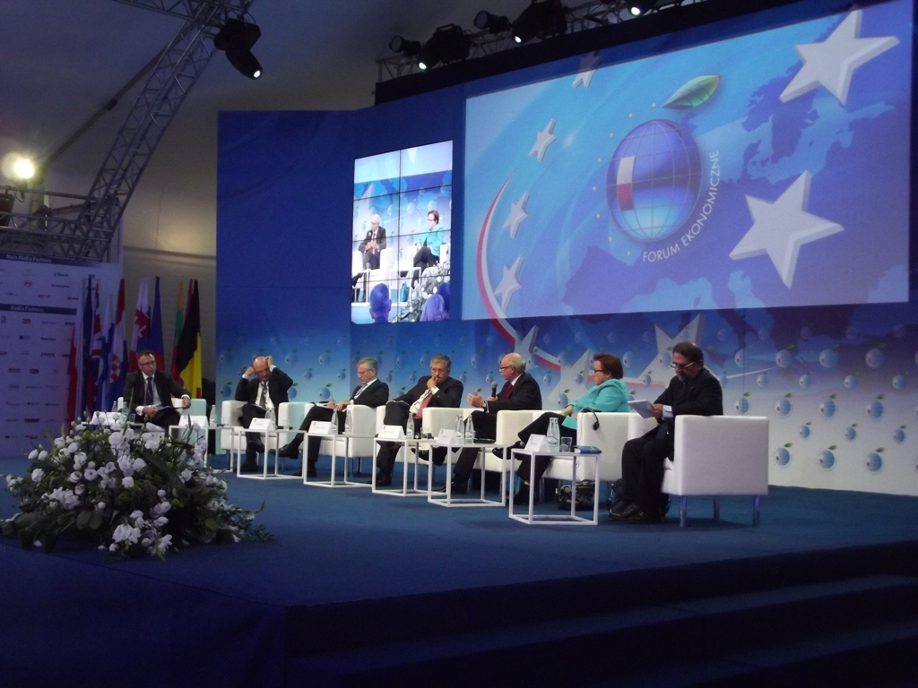 Zdjęcie zrobione podczas XXIII Forum Ekonomicznego w Krynicy-Zdroju.